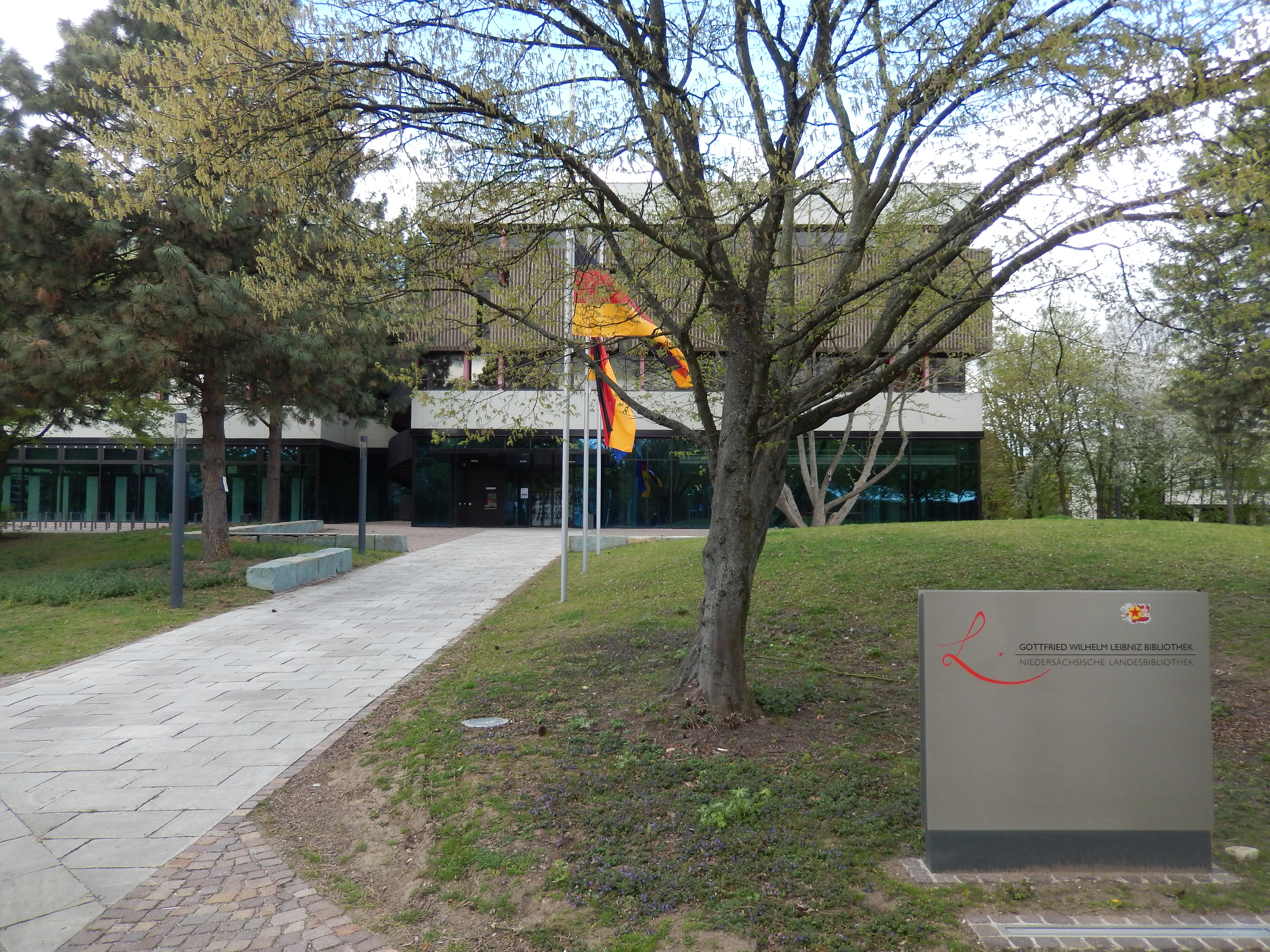 Gottfried Wilhelm Leibniz Bibliothek in Hannover